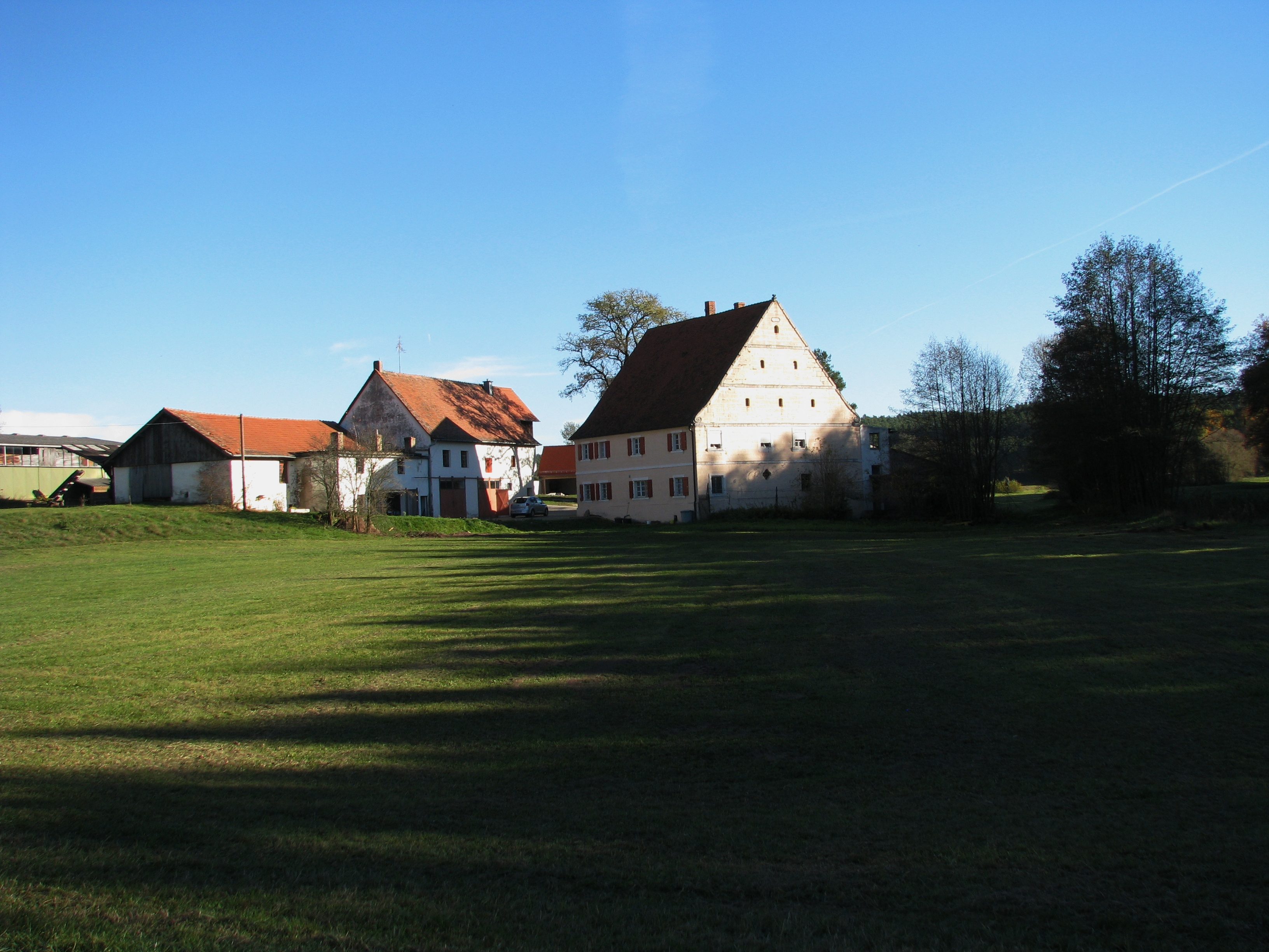 Weihersmühle, Ortsteil von Hilpoltstein im mittelfränkischen Landkreis Roth